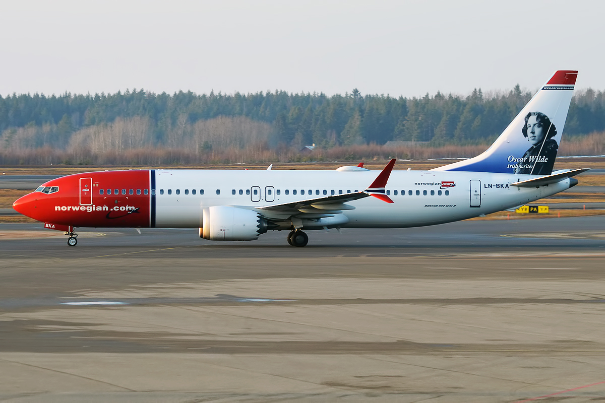 Norwegian (Oscar Wilde Livery), LN-BKA, Boeing 737-8 MAX